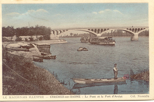 Vue du Pont d'Arciat. On aperçoit aussi "Le Parisien", qui transportait les gens de Mâcon à Lyon. Sur la gauche, une péniche est accostée au ponton. On aperçoit des sacs blancs, probablement de la chaux issue du Four à Chaux tout proche. Carte postale ancienne tirée de la collection privée de M. Deudon (Lyon), avec son autorisation.